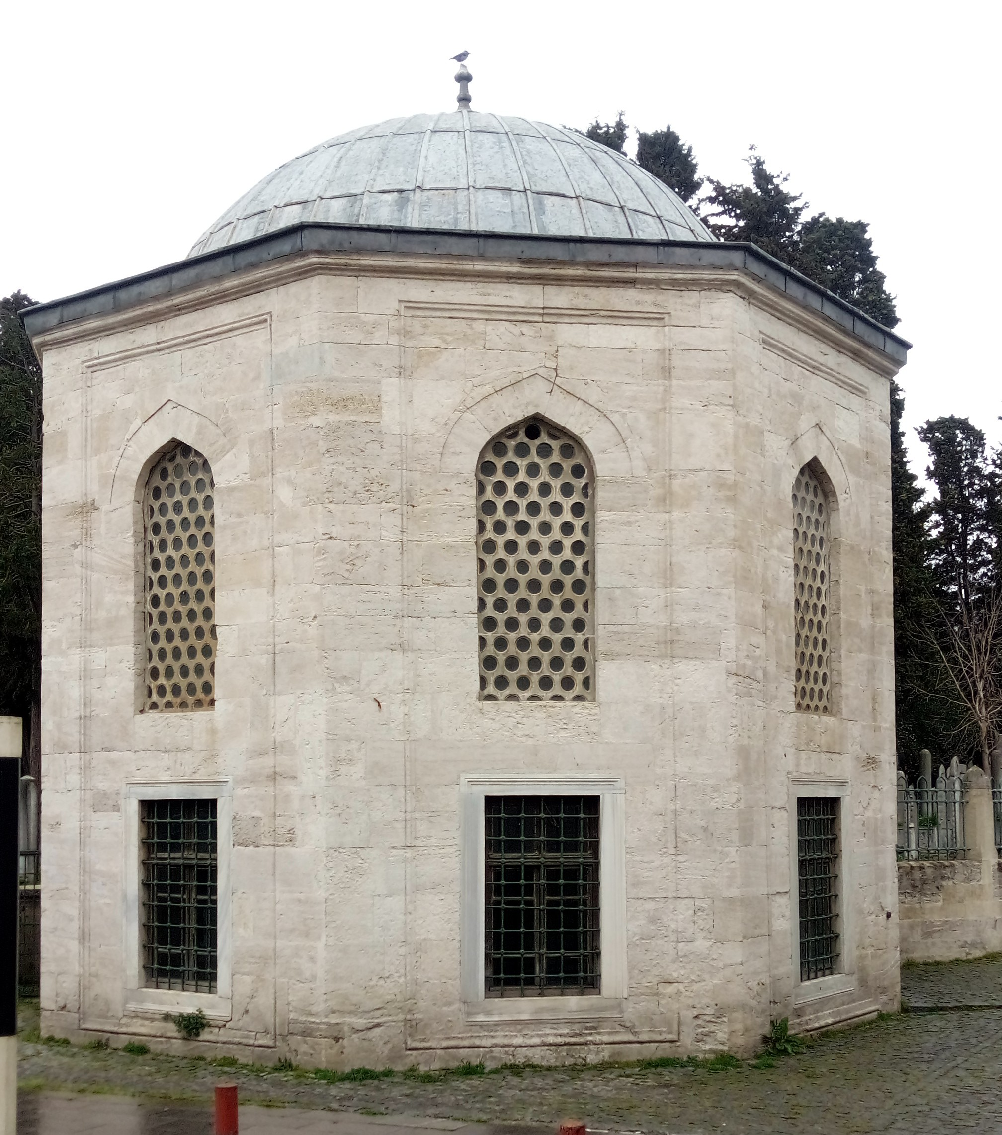 Şekerpare Kadın Türbesi Eyüp Sultan'da